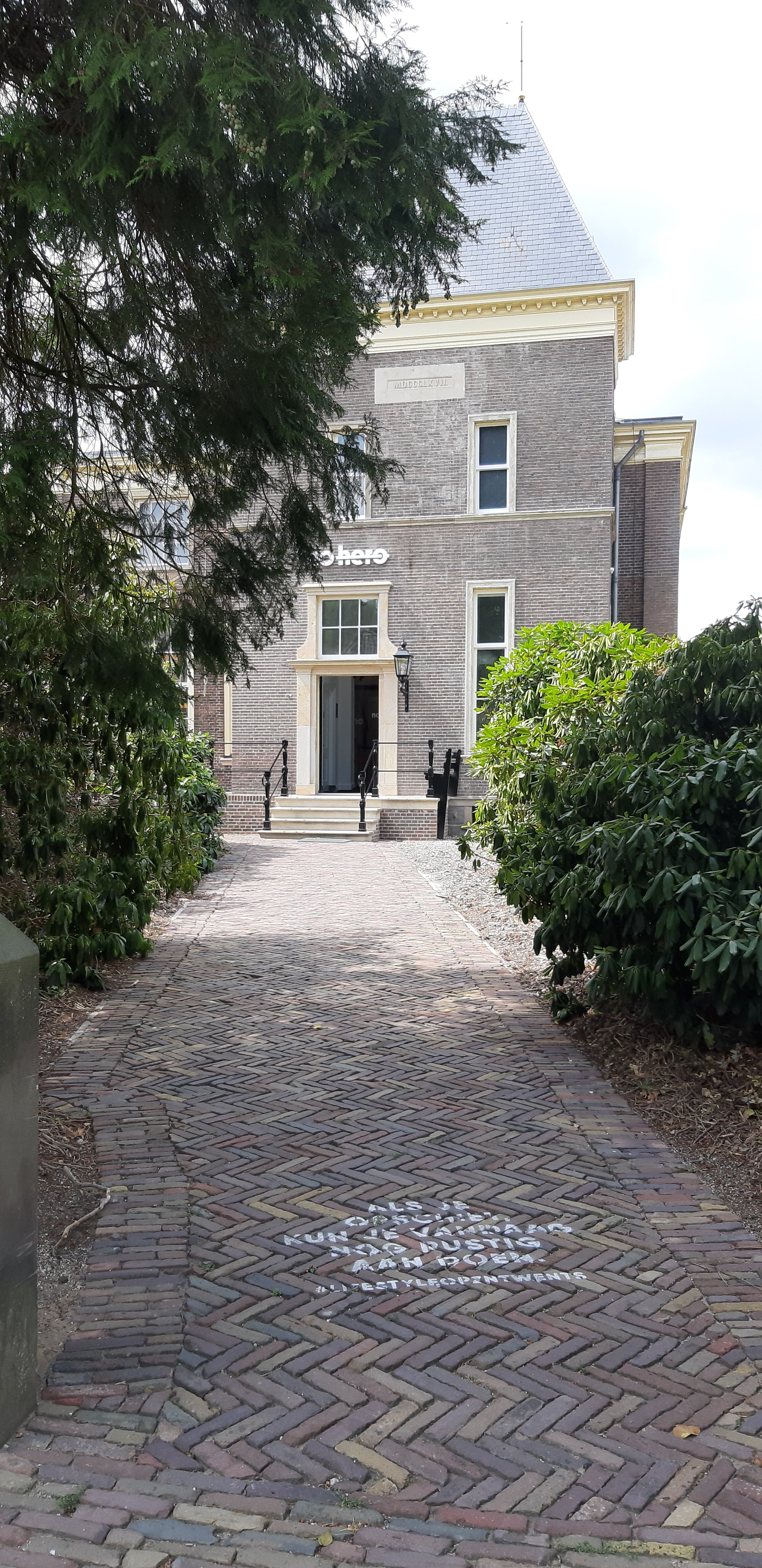 Ingang museum No Hero, juli 2019